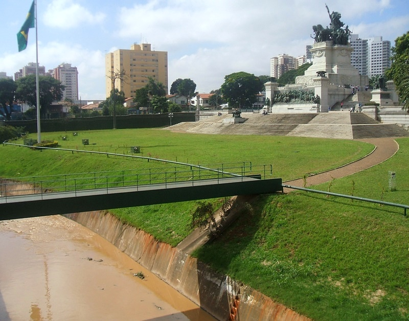 Monumento à Independência do Brasil, de Ettore Ximenes, visto do Riacho do Ipiranga. Parque Independência, bairro do Ipiranga, cidade de São Paulo.